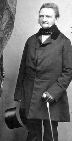 Georg Theodor Meyer (1798-1870), deutscher Jurist und Politiker, Mitglied der Frankfurter Nationalversammlung und Kultusminister des Königreichs Hannover